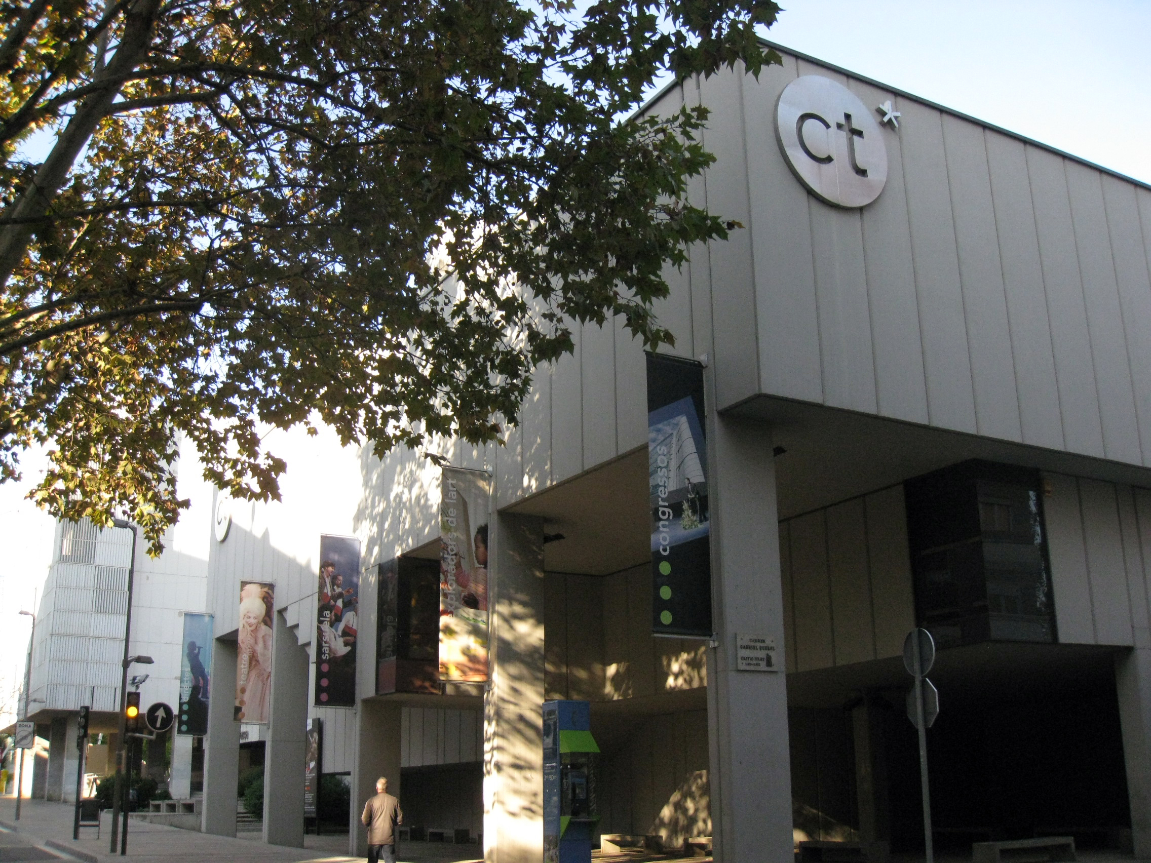 Centre Cultural de la Caixa de Terrassa (Terrassa)